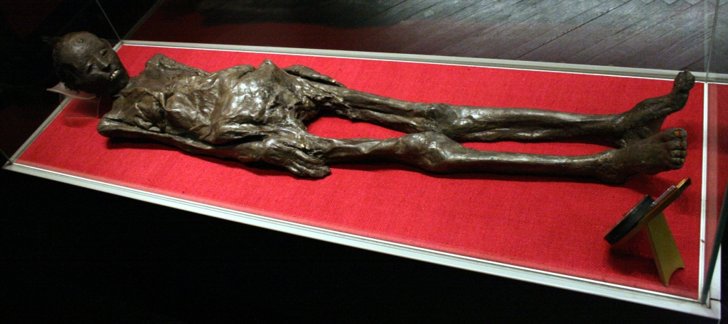 Zagrebačka mumija